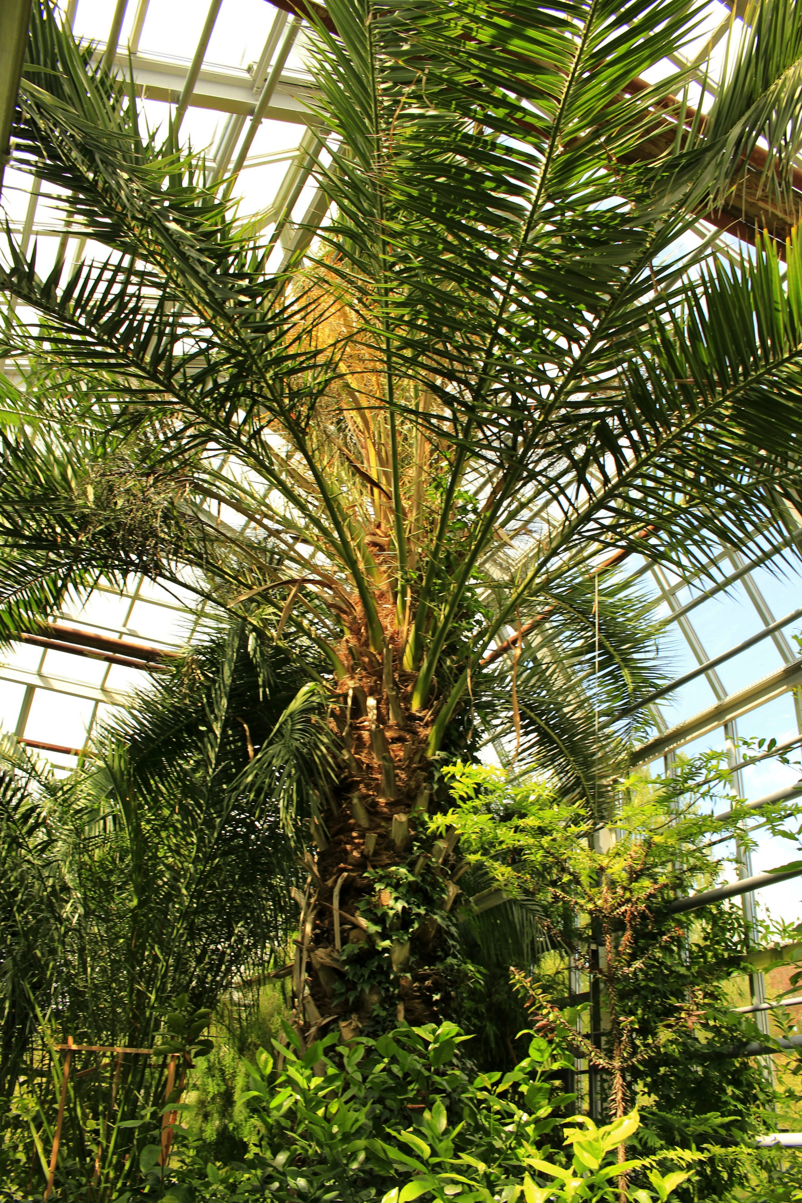 Botanikos sodo oranžerija